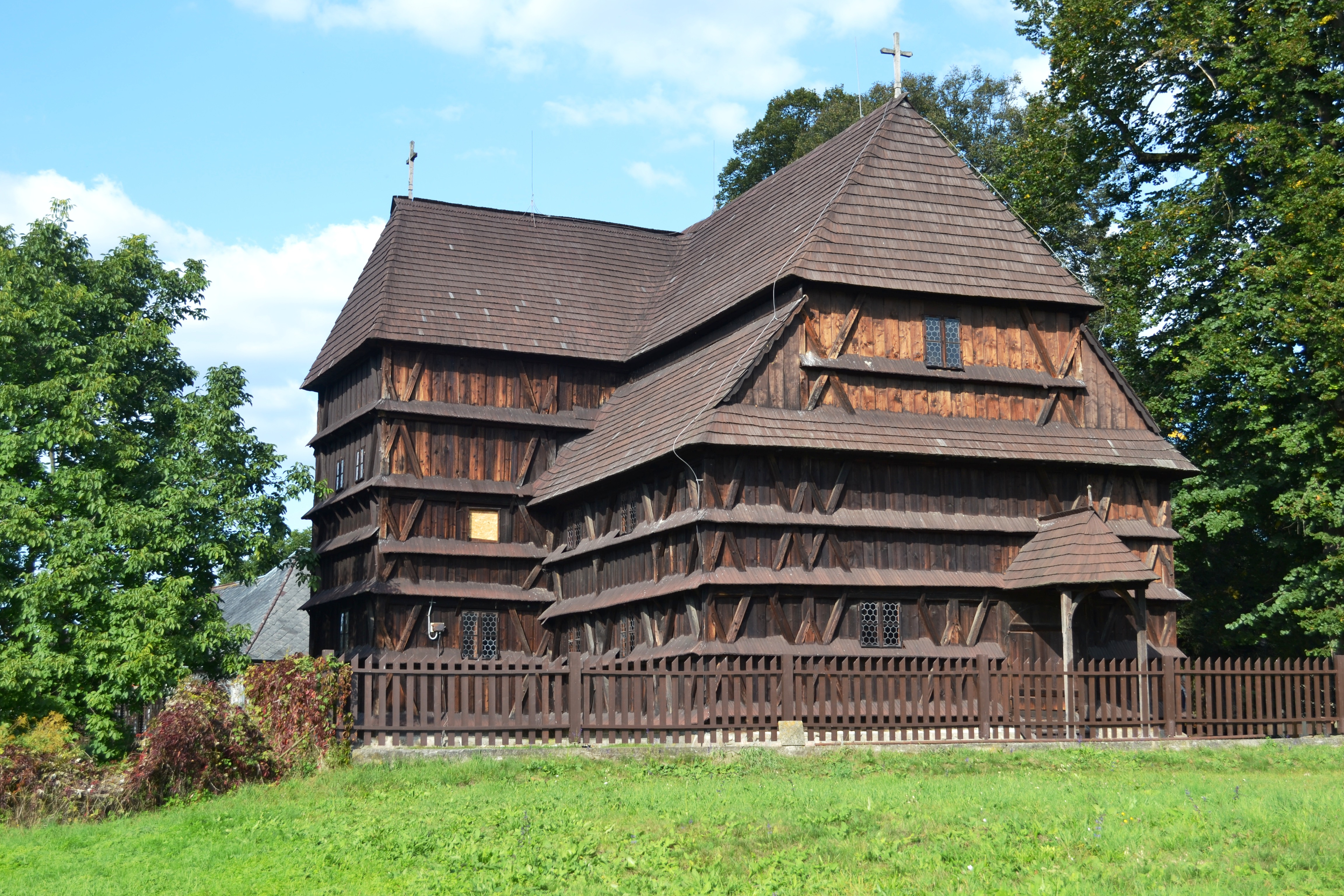 Drevený artikulárny kostol v Hronseku je zapísaný do Zoznamu svetového kultúrneho a prírodného dedičstva UNESCO. Drevená sakrálna architektúra je skvostom slovenskej ľudovej tvorby. Zvláštnosťou je, že objekty sú postavené výlučne z dreva a pri ich stavbe nemohol byť použitý ani jeden klinec. Vyznačujú sa originalitou a jedinečným technicko-umeleckým riešením